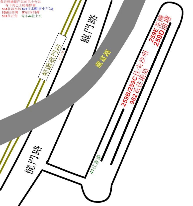 中文（香港）: 龍門居巴士總站的平面圖